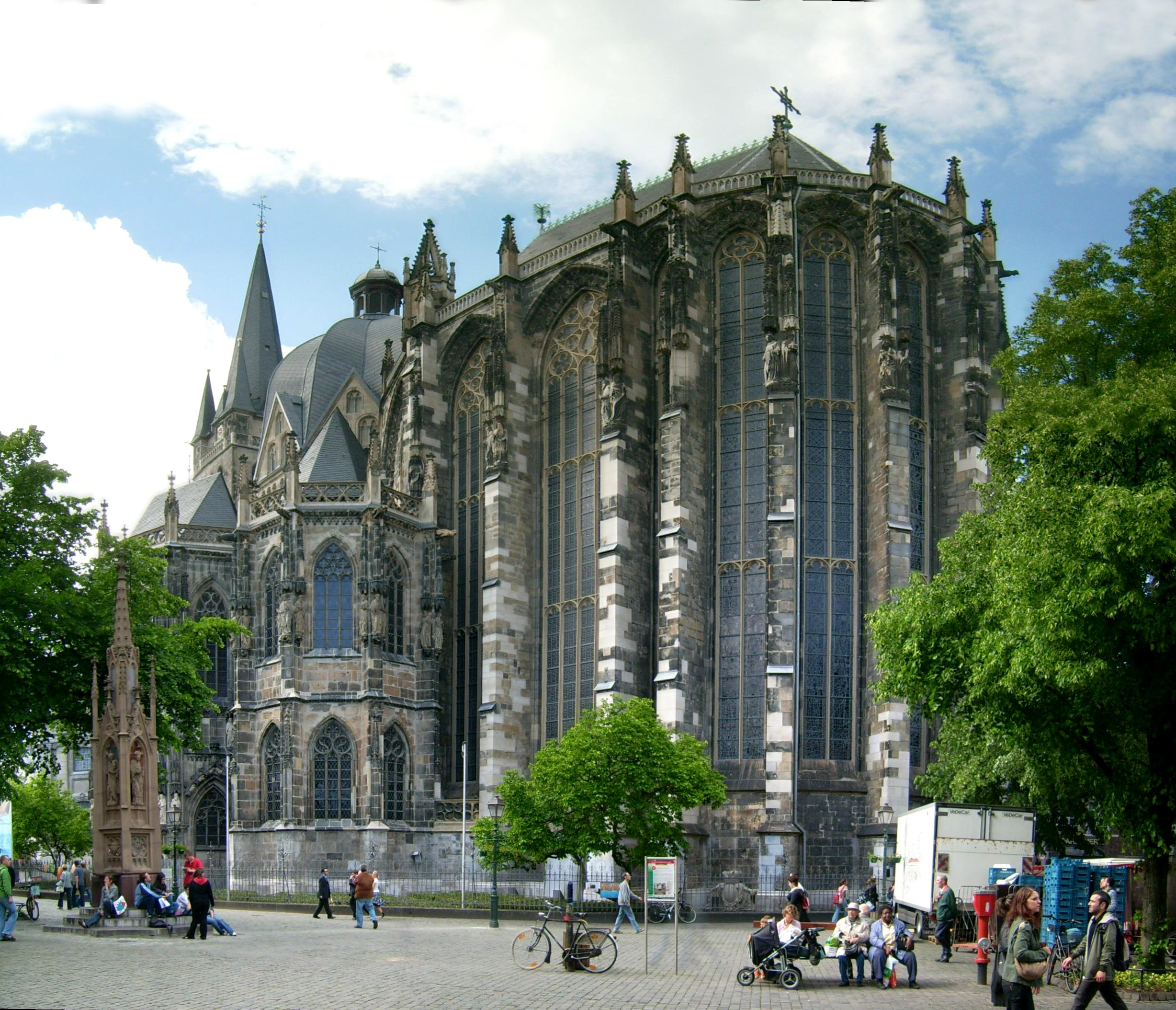 Aachener Dom von Osten